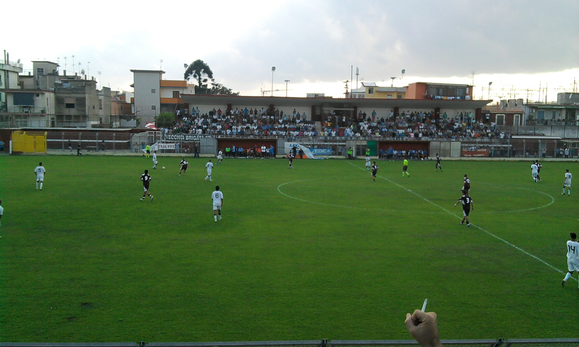 Pomigliano 2-3 Savoia